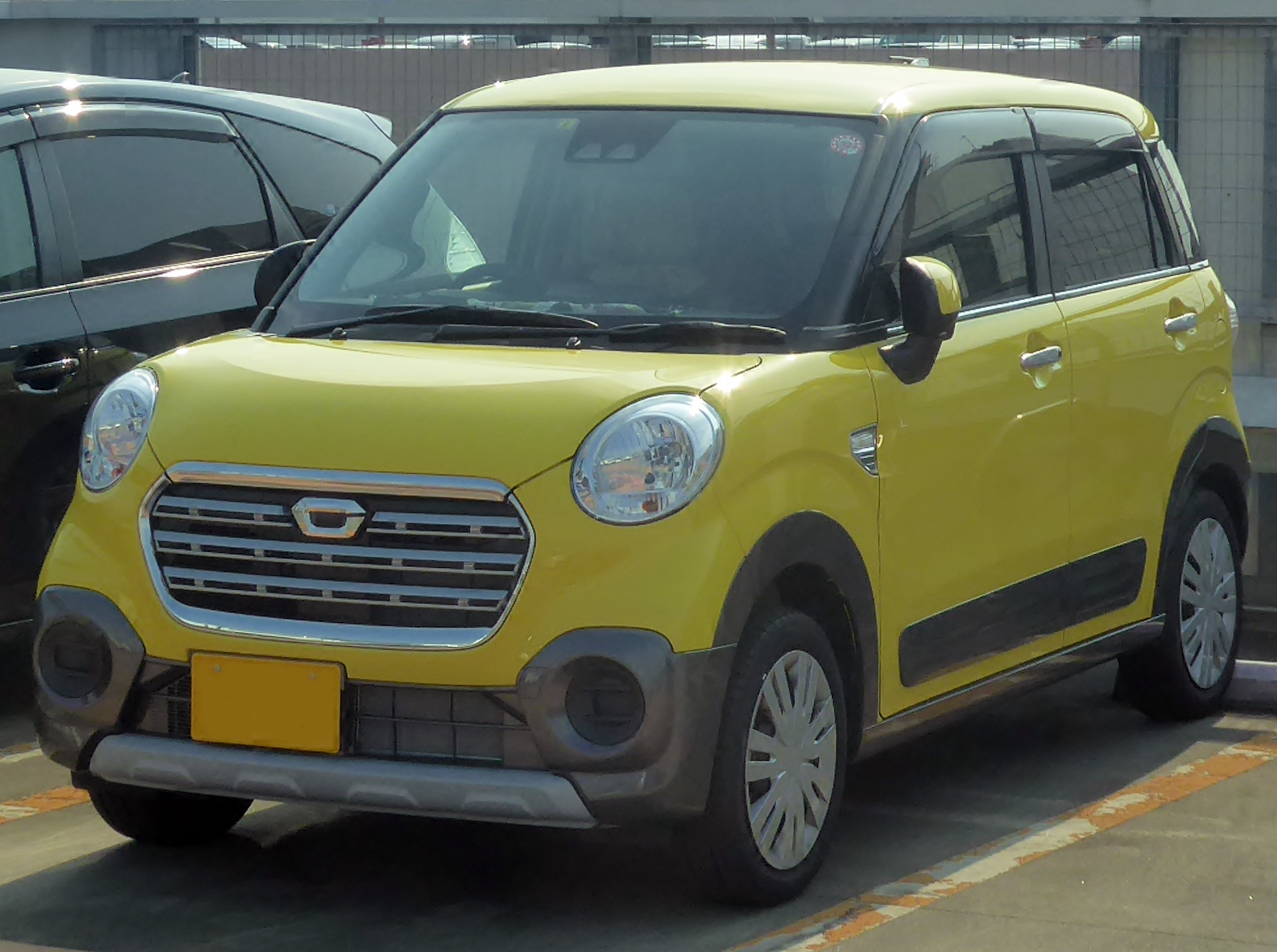 DBA-LA250S-GBDF型ダイハツ・キャストアクティバX"SA III"2WDをフロントから撮影。